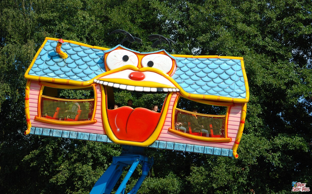 La Maison la plus Folle de l'Oise - Parc Saint Paul